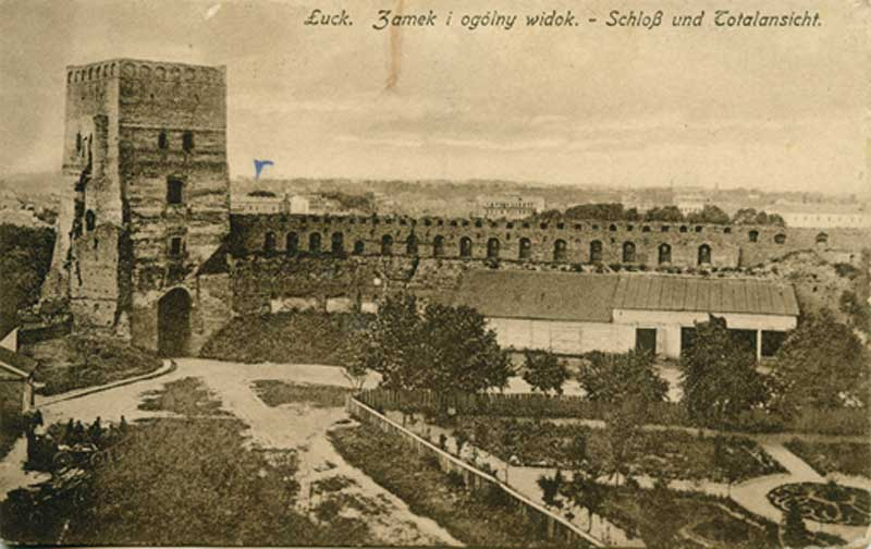 Всередині замку: Поштова листівка